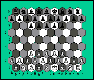 Figura do tabuleiro REX com as peças no início da partida.